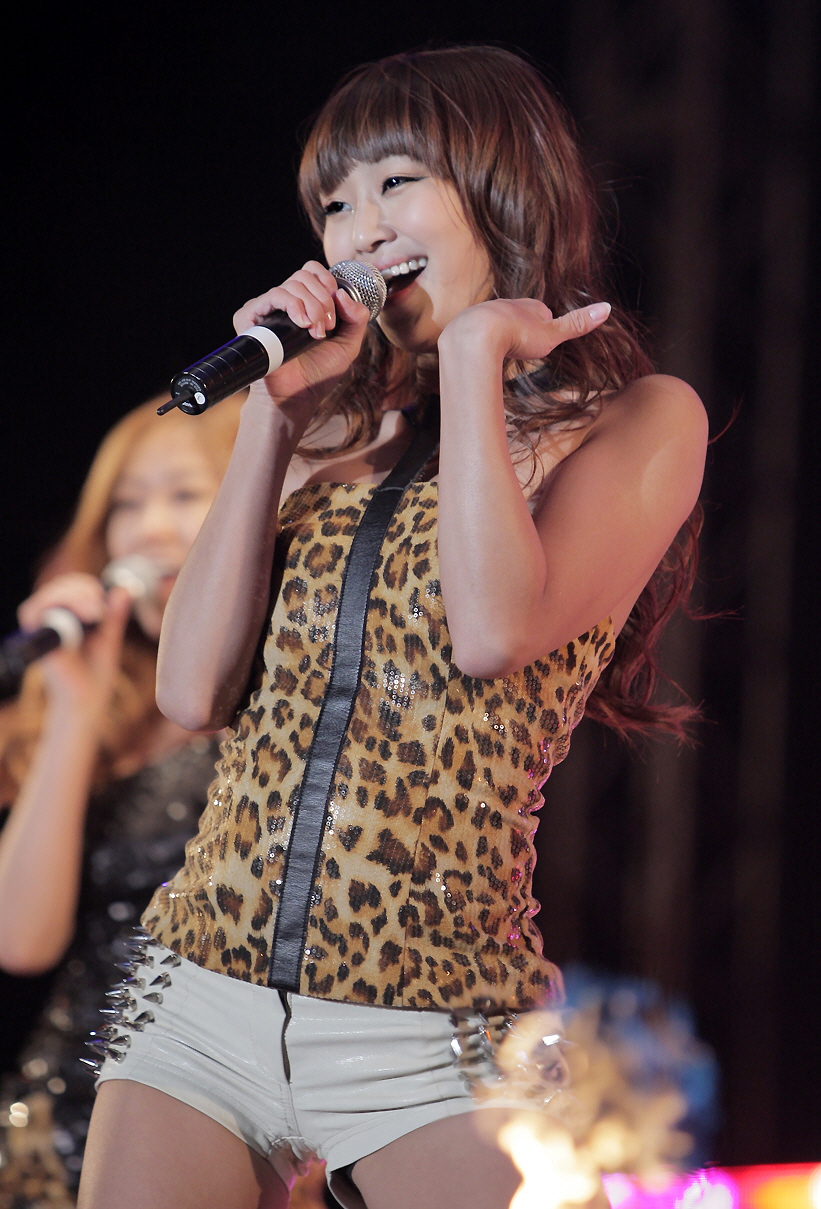 2011. 10. 02. 점프구로 폐막공연 컬투쇼 공개방송 씨스타 _ so cool 1280p